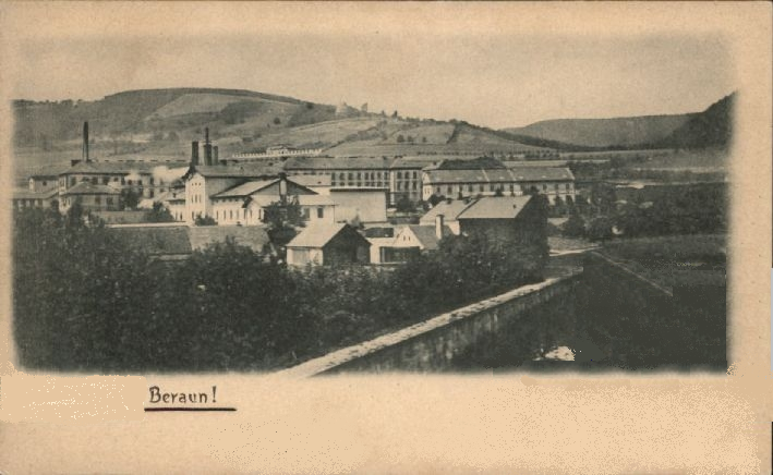 Kaserne in Beraun